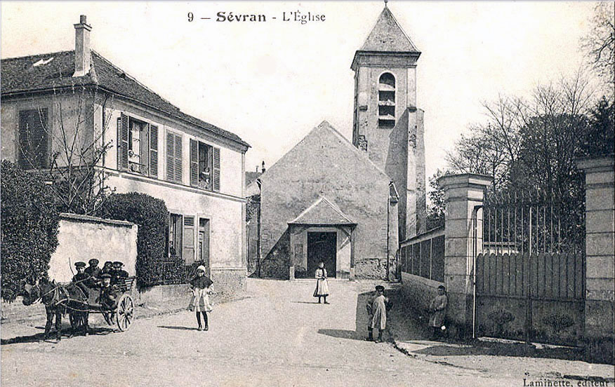 Sevran (France) - L'église Saint-Martin vers 1900